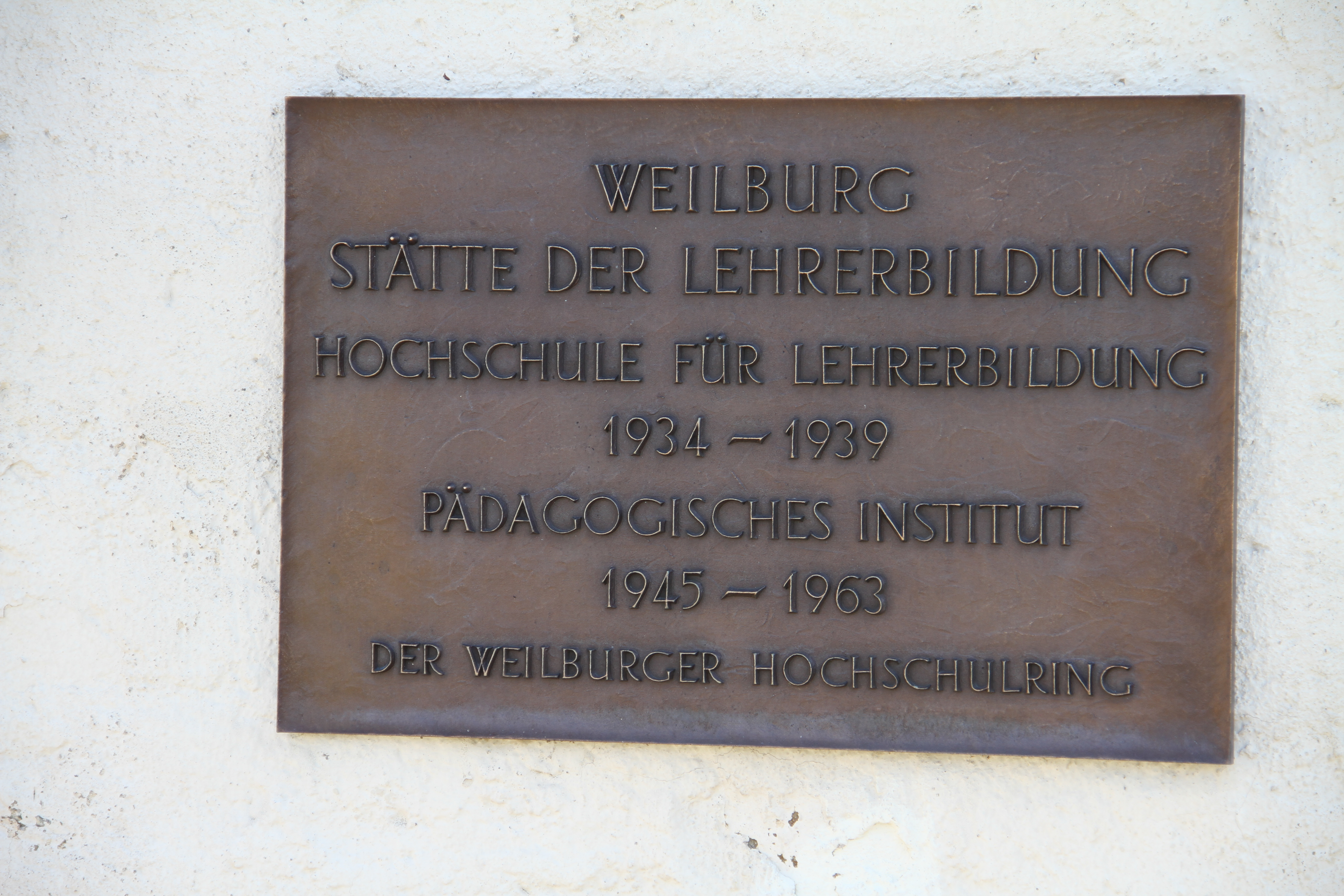 Windhof in Weilburg Dieses Foto entstand im Rahmen des Projekts Wiki Loves Monuments Mittelhessen, das aus dem Community-Projektbudget von Wikimedia Deutschland e. V. gefördert wurde.